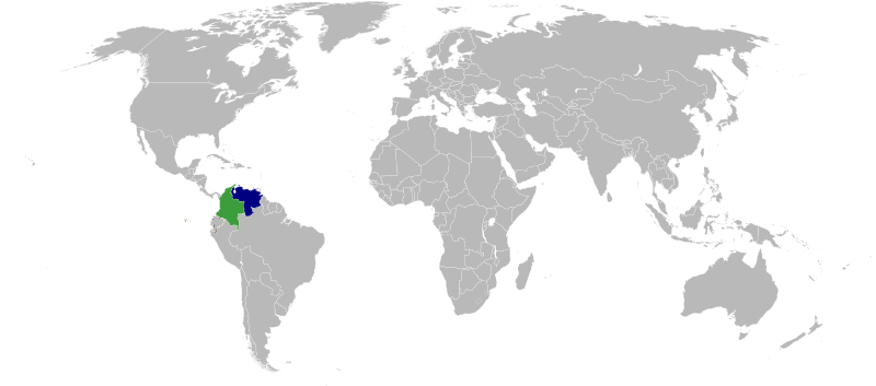 Mapa Crisis Caldas